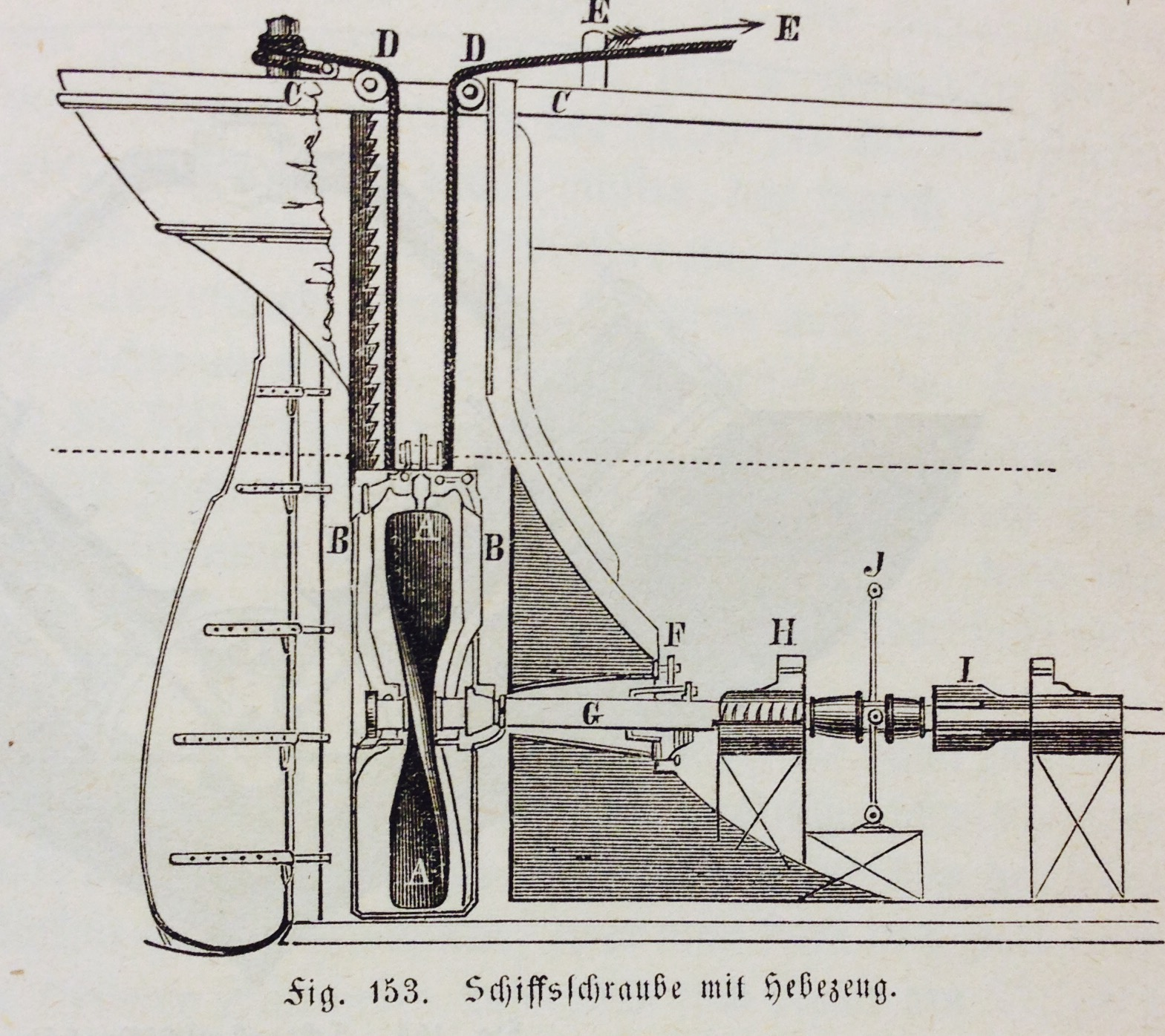 Schiffsschraube mit Hebezeug. „Der Weltverkehr und seine Mittel“, Leipzig und Berlin 1875.